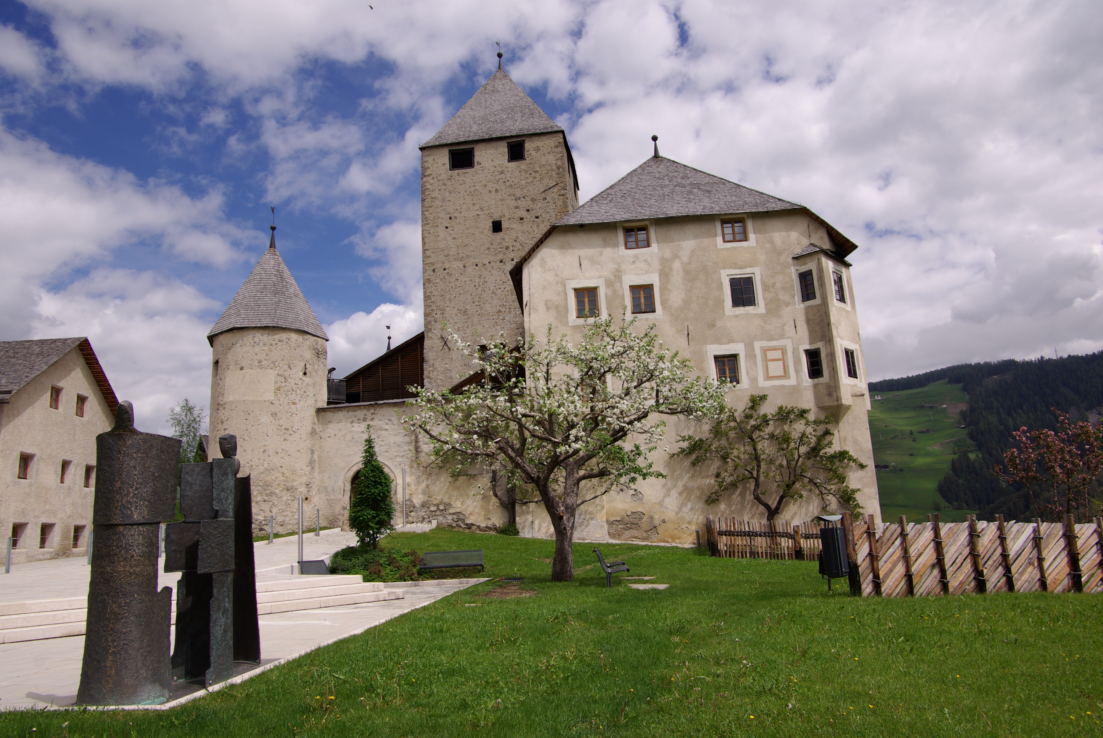 Museum Ladin Ćiastel de Tor